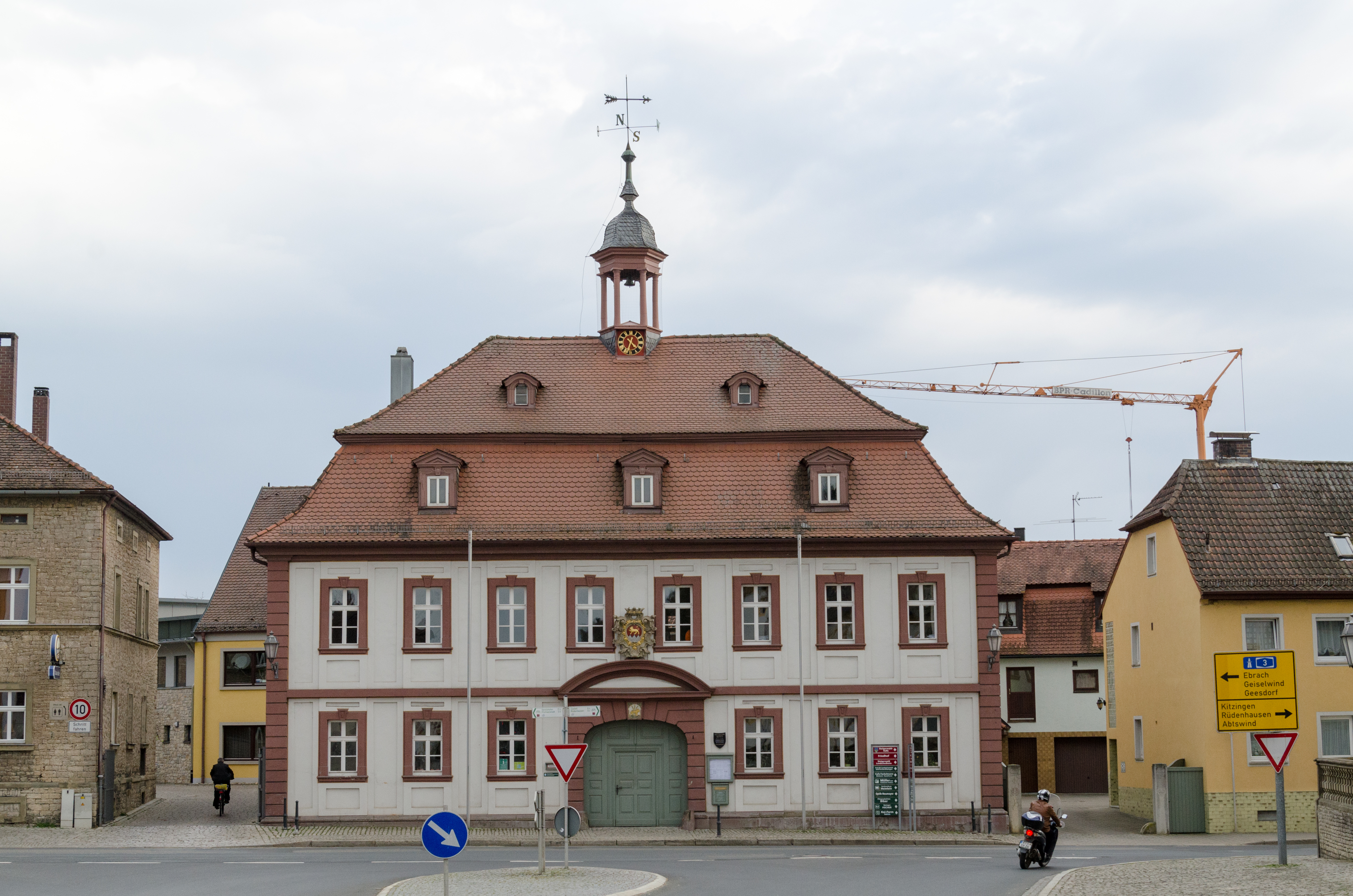 Wiesentheid, Rathaus